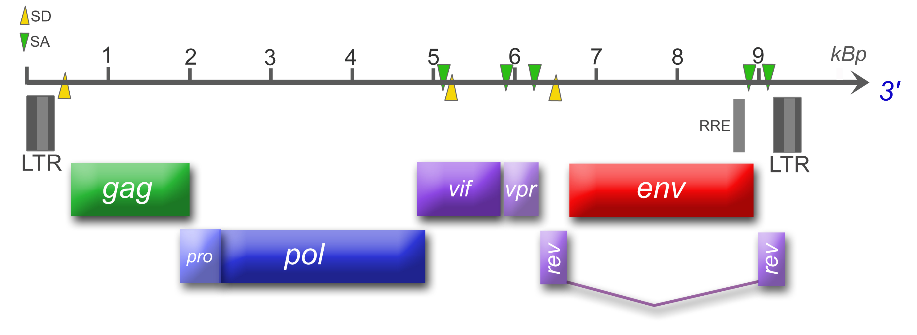 Genomorganisation des Felinen Immundefizienz-Virus (FIV). Größenangabe in Kilobasenpaaren (kBp); LTR: Long terminal repeat, SD: Splice-Donor, SA: Splice-Akzeptor, RRE: Rev-responsibles Element. Genprodukte sind schattiert abgebildet: gag (Gruppenspezifisches Antigen, Nukleoprotein), pol (Polymerase), pro (Protease-Domäne), env (glykosylierte Hüllproteine), regulatorische Proteine (vif, vpr, rev). Exons des rev sind miteinander verbunden.